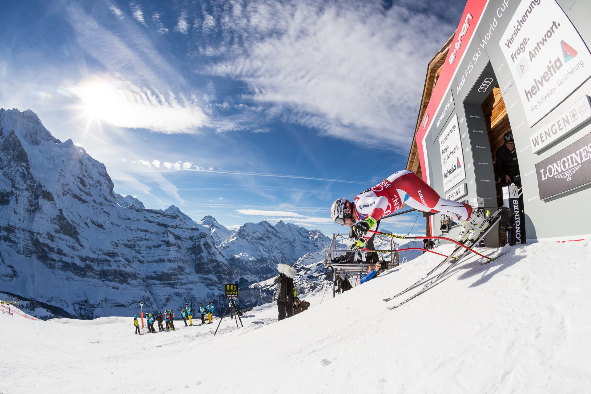 Beat Feuz beim Starthaus der Lauberhornabfahrt 2019 in Wengen BE, Schweiz